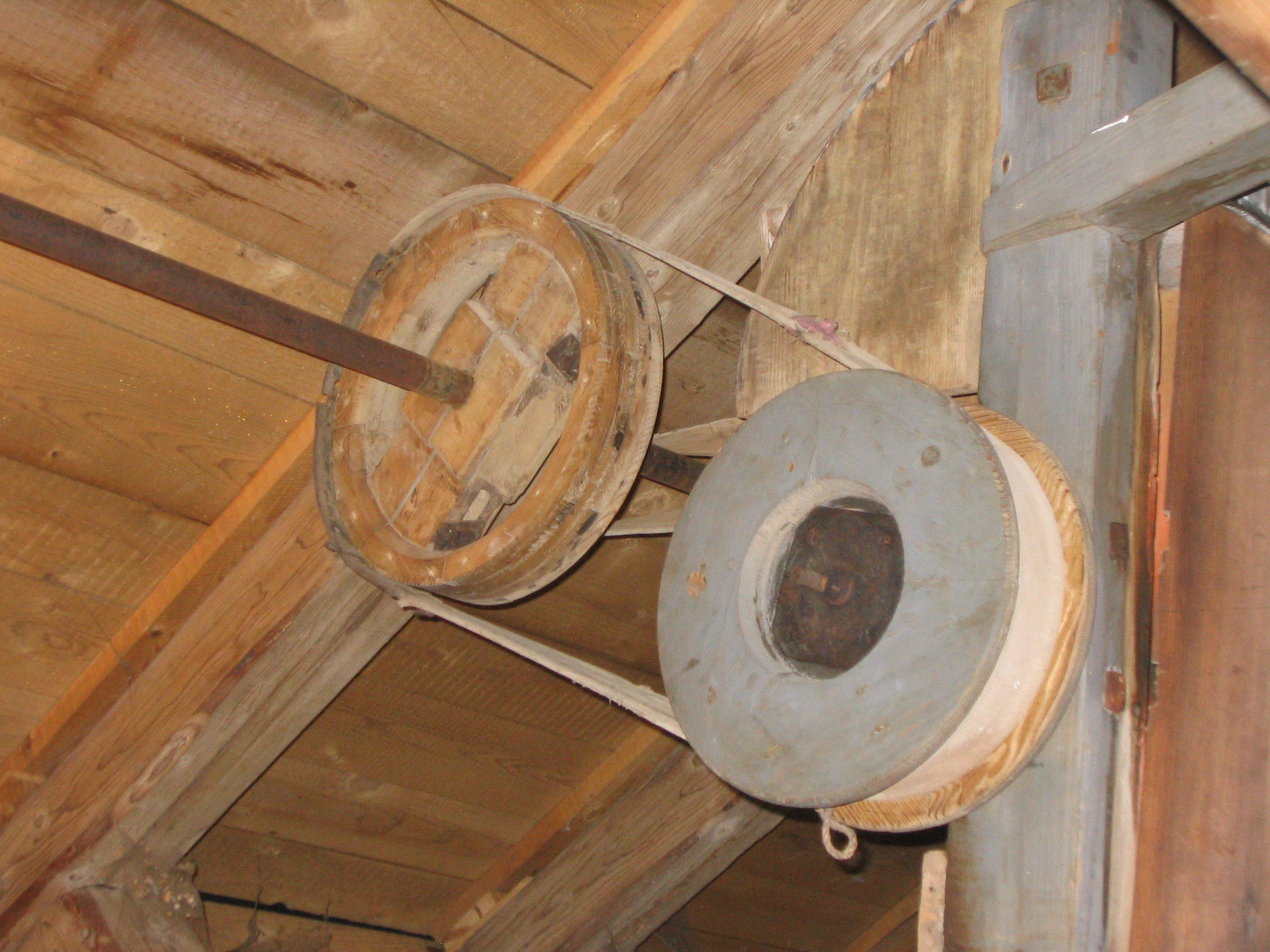 Riemenantrieb in der Mühle Boll